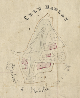 Creu, de Matamala, el 1812 (Cadastre napoleònic, Arxius Departamentals dels Pirineus Orientals, ADPO)